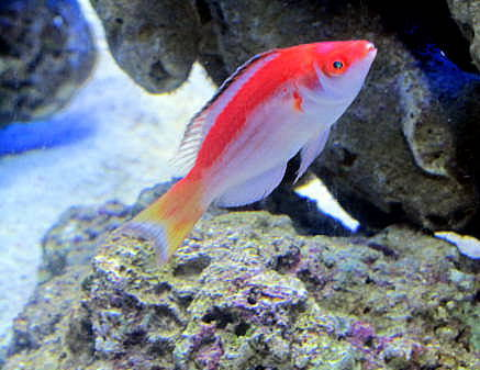 Cirrhilabrus marjorie maschio